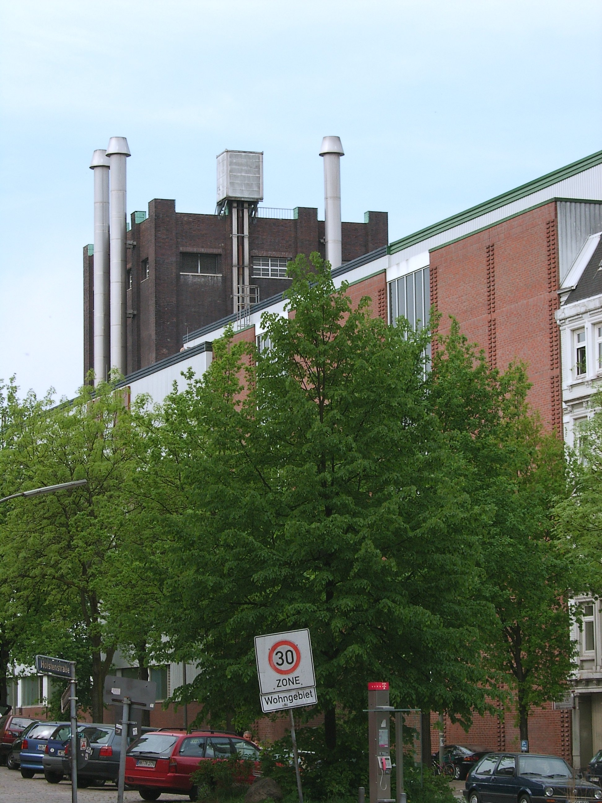 Bildbeschreibung: Hamburg, Altona, Holstenbrauerei Fotograf: selbst Datum: 13.5.2006